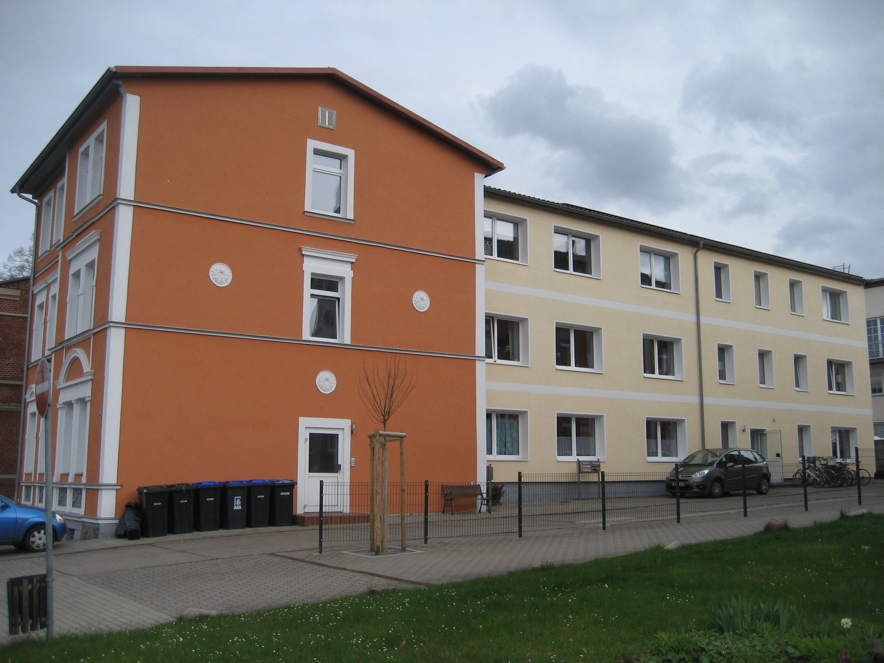 Gebäude des ehemaligen Amtsgerichtes Röbel/Müritz in der Bahnhofstraße 33.